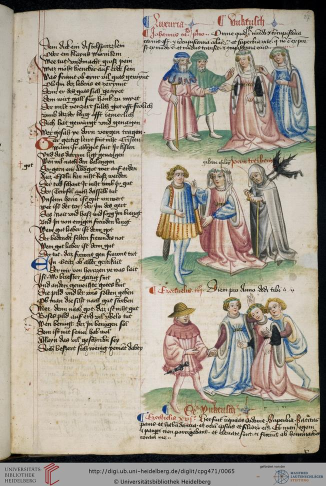 Hugo von Trimberg "Der Renner"